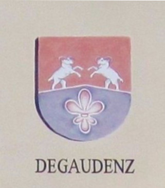 Cognomi storici dei Vicini che discendono dalle famiglie della Regola che abitavano a Predazzo e riguardano 19 cognomi: Boninsegna, Bonora, Bosin, Brigadoi, Defrancesco, Degaudenz, Dellagiacoma, Dellantonio, Dellasega, Demartin, Dezulian, Felicetti, Gabrielli, Giacomelli, Guadagnini, Morandini, Nicolao, Piazzi e Zanna.